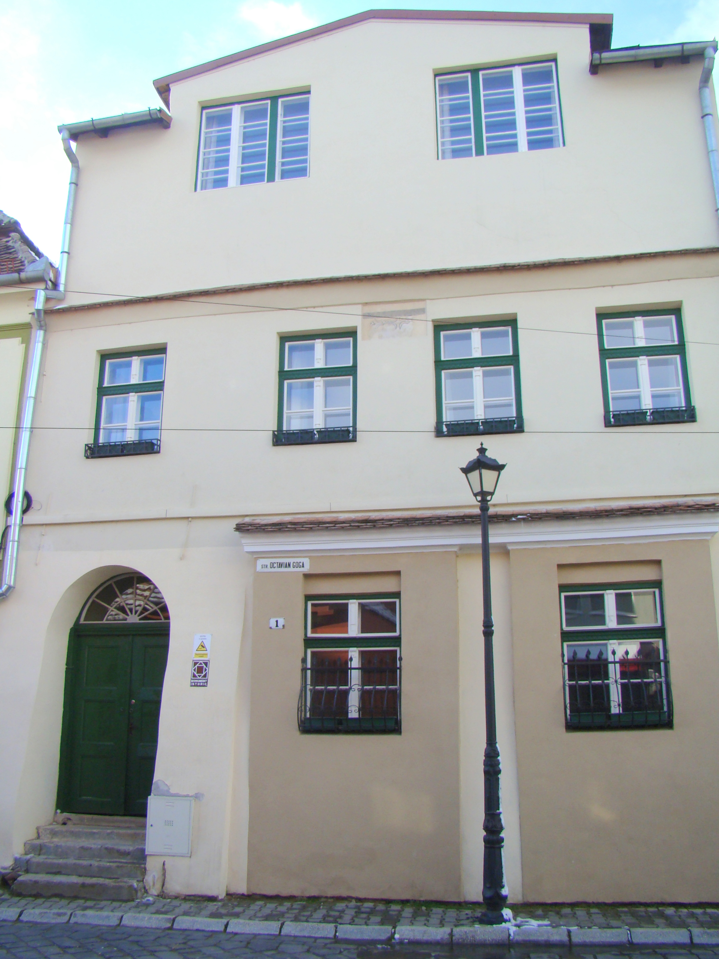 Casa Augustin, municipiul Sighișoara, Piața Goga Octavian 1 sec. XVIII - XIX,1930-1940